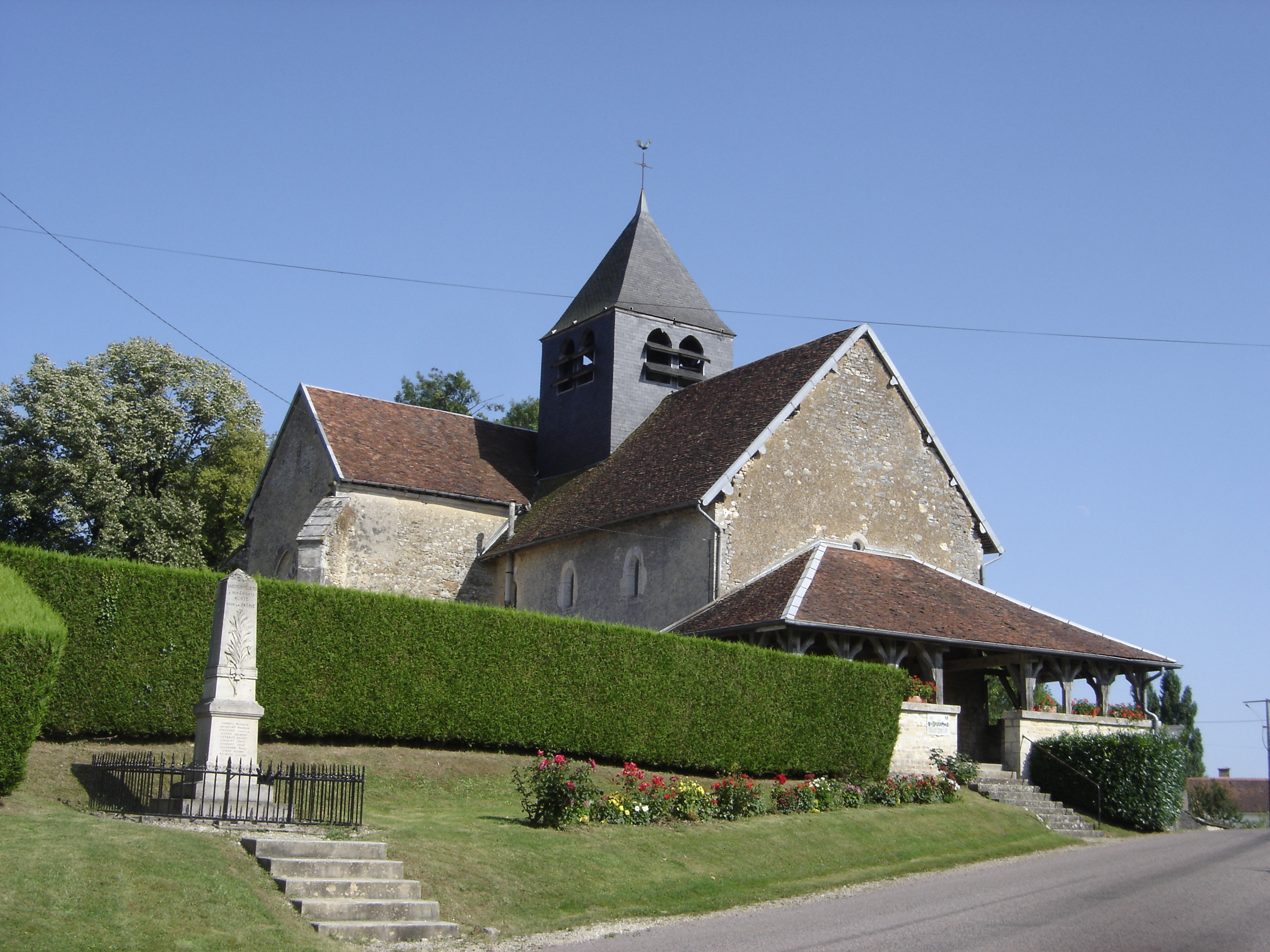 église Saint-Pierre et Saint-Paul de Vauchonvilliers - Aube - France